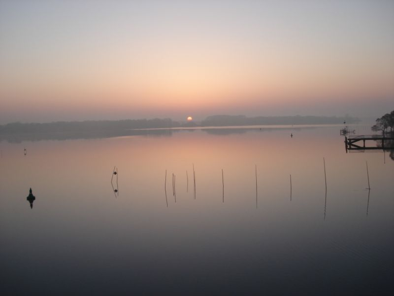 Sonnenaufgang über dem Plauer See am 12.04.2007.